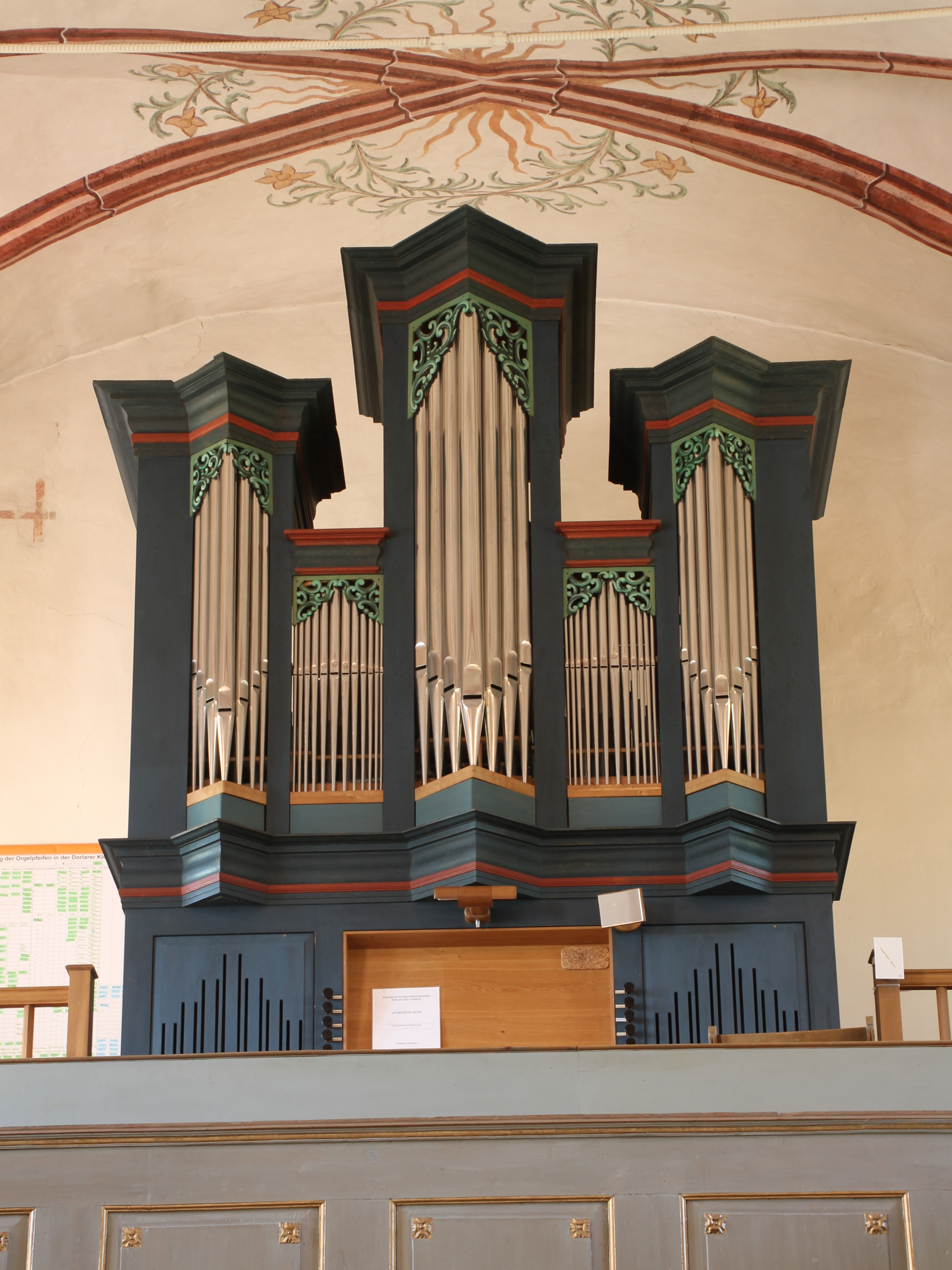 Orgel Kirche Dorlar. Aufnahme bei eingeschalteter elektrischer Beleuchtung. Aufnahme File:Evangelische Kirche Dorlar (innen) (002).jpg wenige Min. später bei ausgeschalteter elektrischer Beleuchtung. Blende, Belichtungszeit u. ASA/ISO siehe Exifdaten. Die Farbeinstellungen der Kamera wurden nicht verändert.